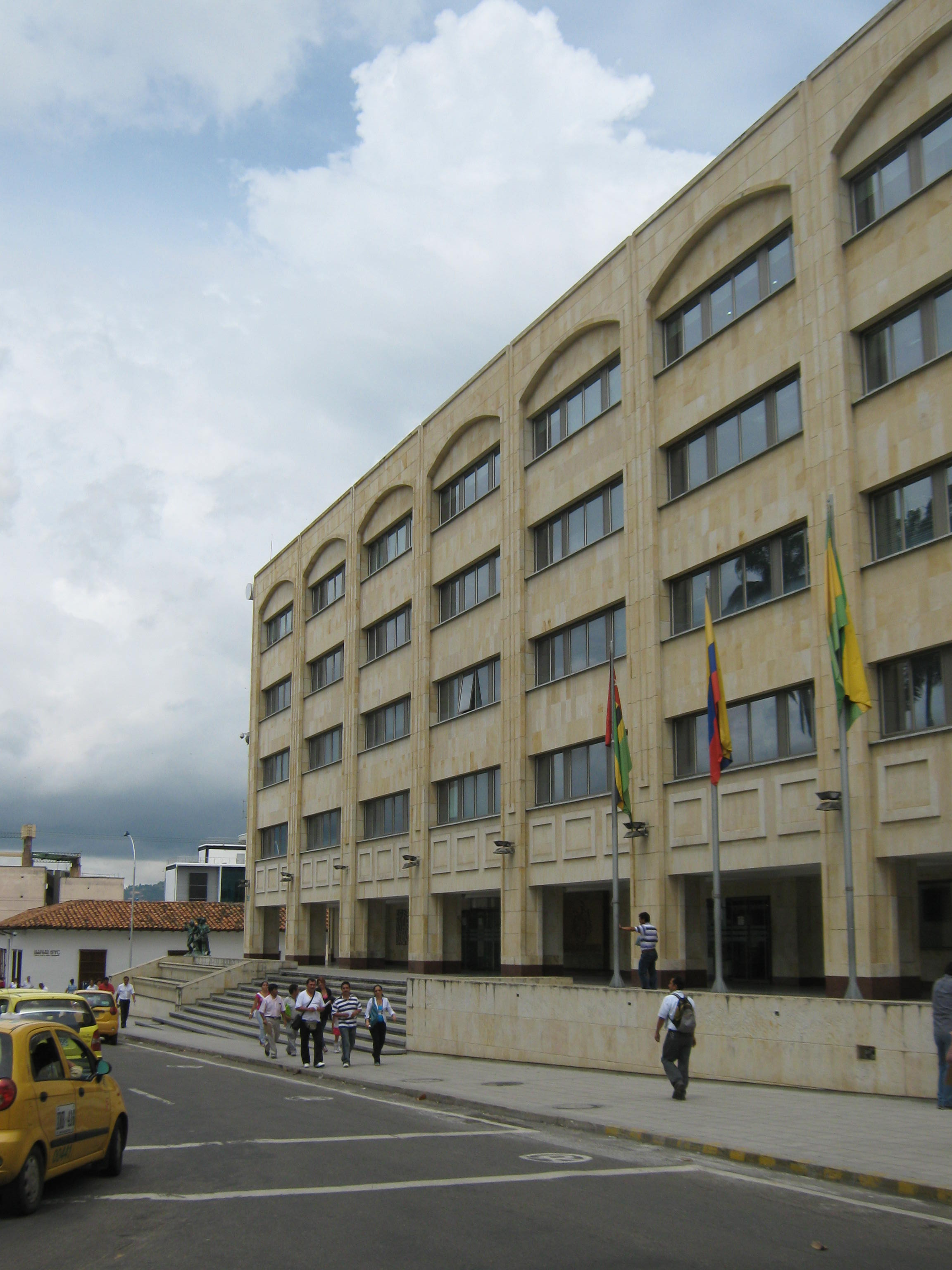 Edificio Alcaldia de Bucaramanga